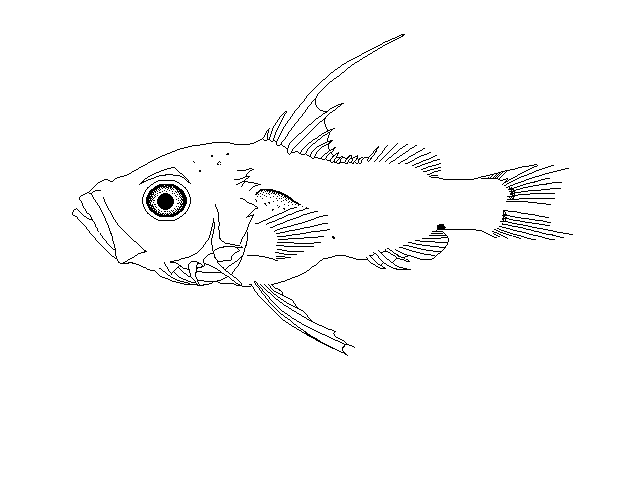 Niphon spinosus larva